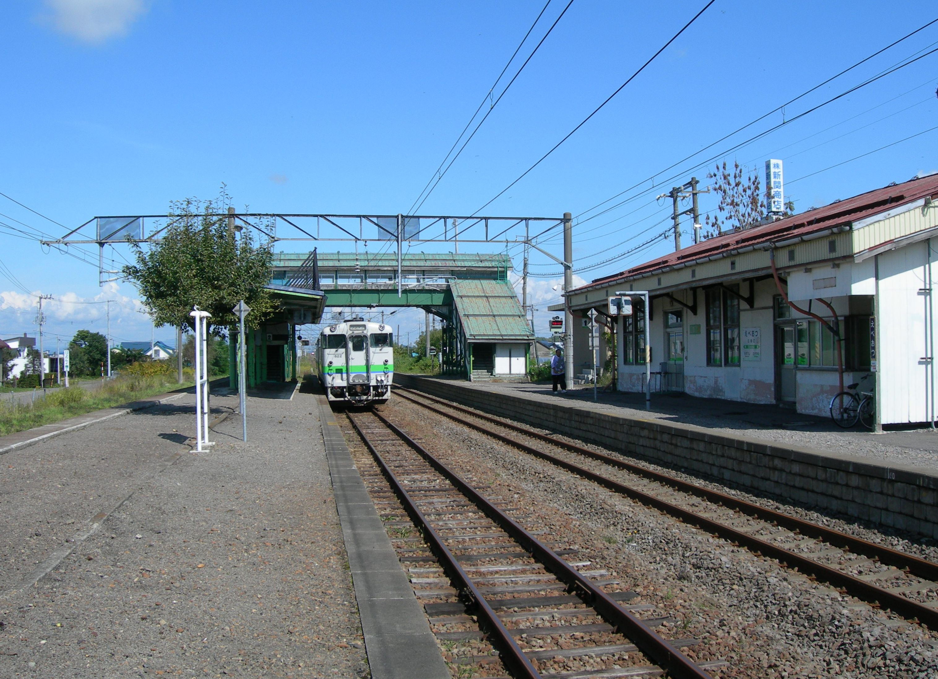 江部乙駅ホーム